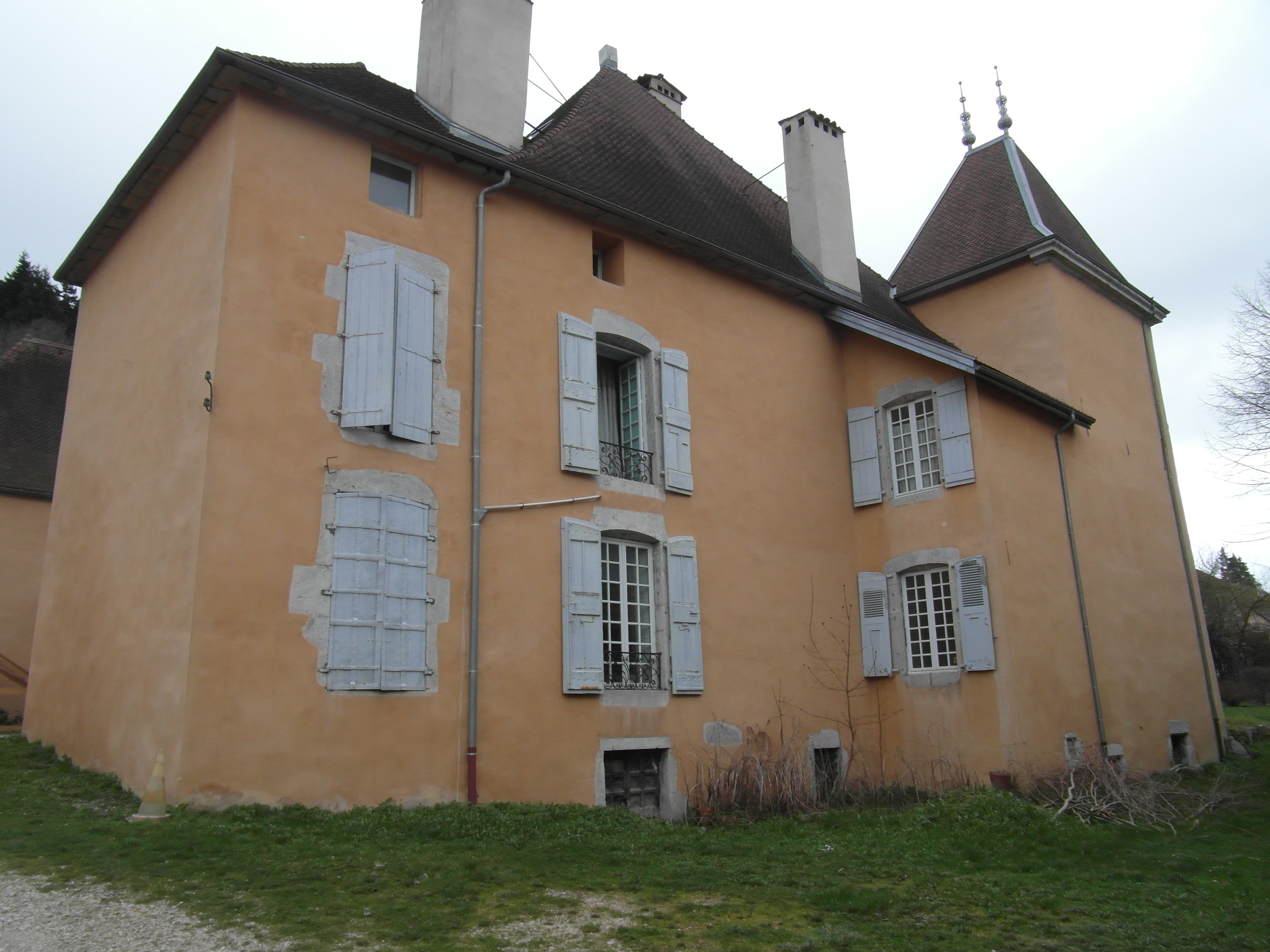 Château de Bardonenche à Monestier de Clermont